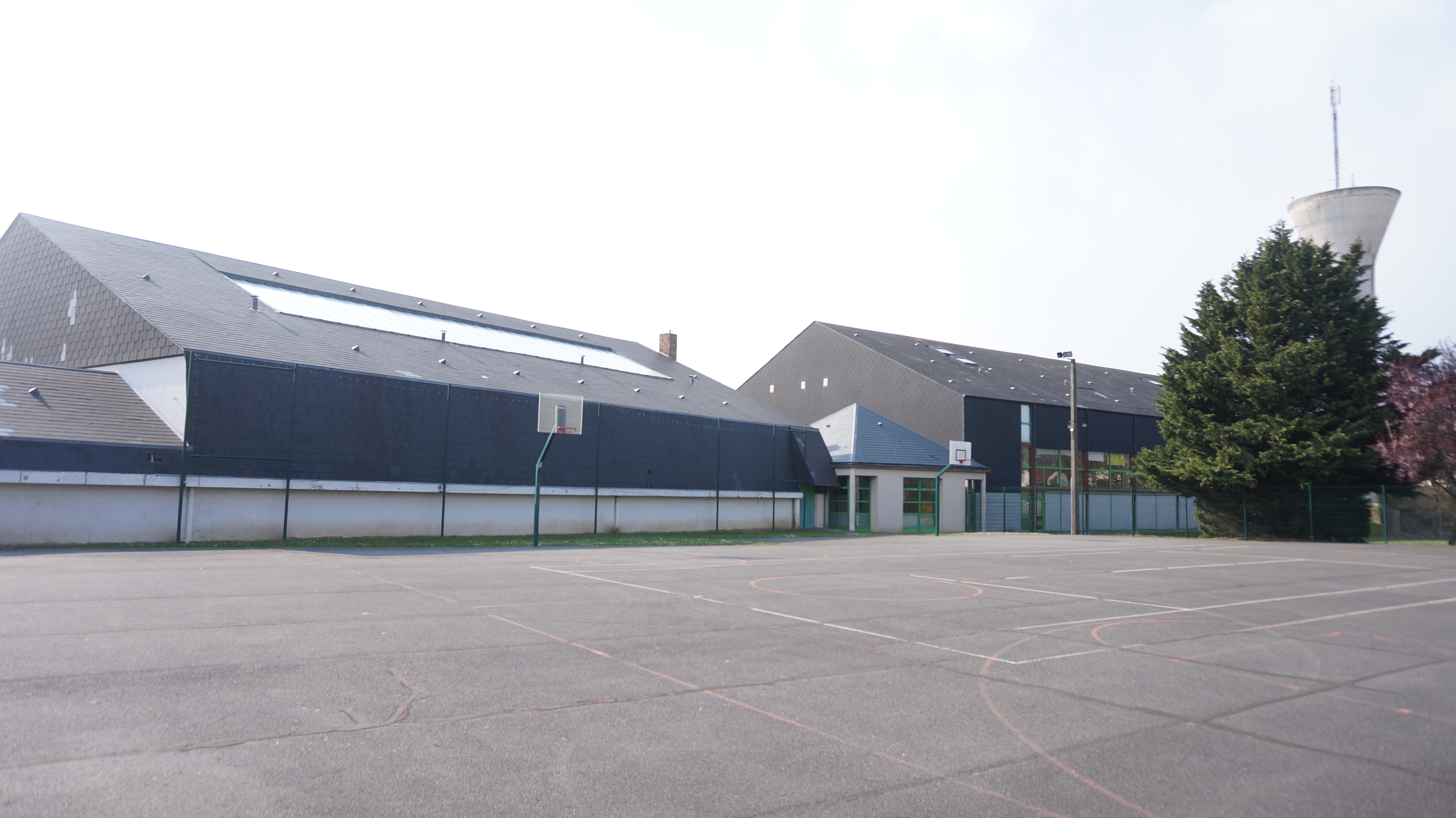 Le terrain de la ville de Ormes, dans le département français du Loiret.